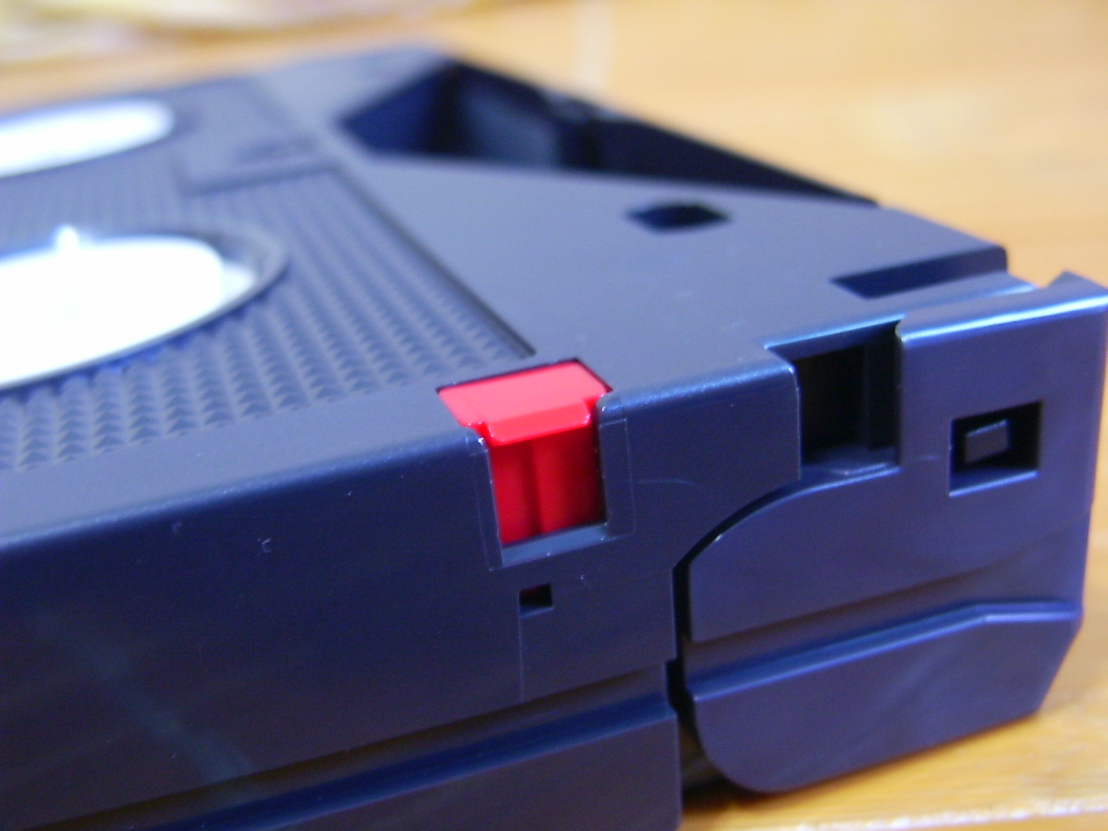 An ED Beta's record clip.